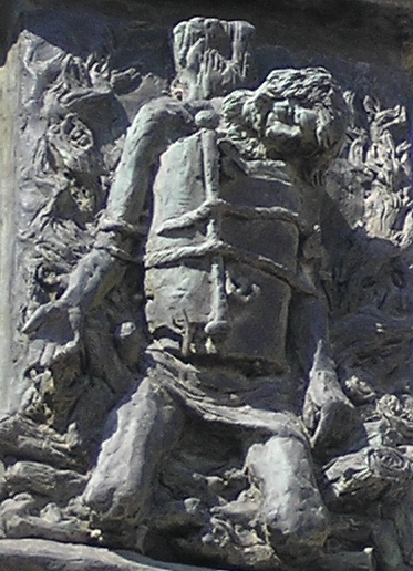 The Knesset Menorah, Jerusalem (detail - Haninah ben Teradion)